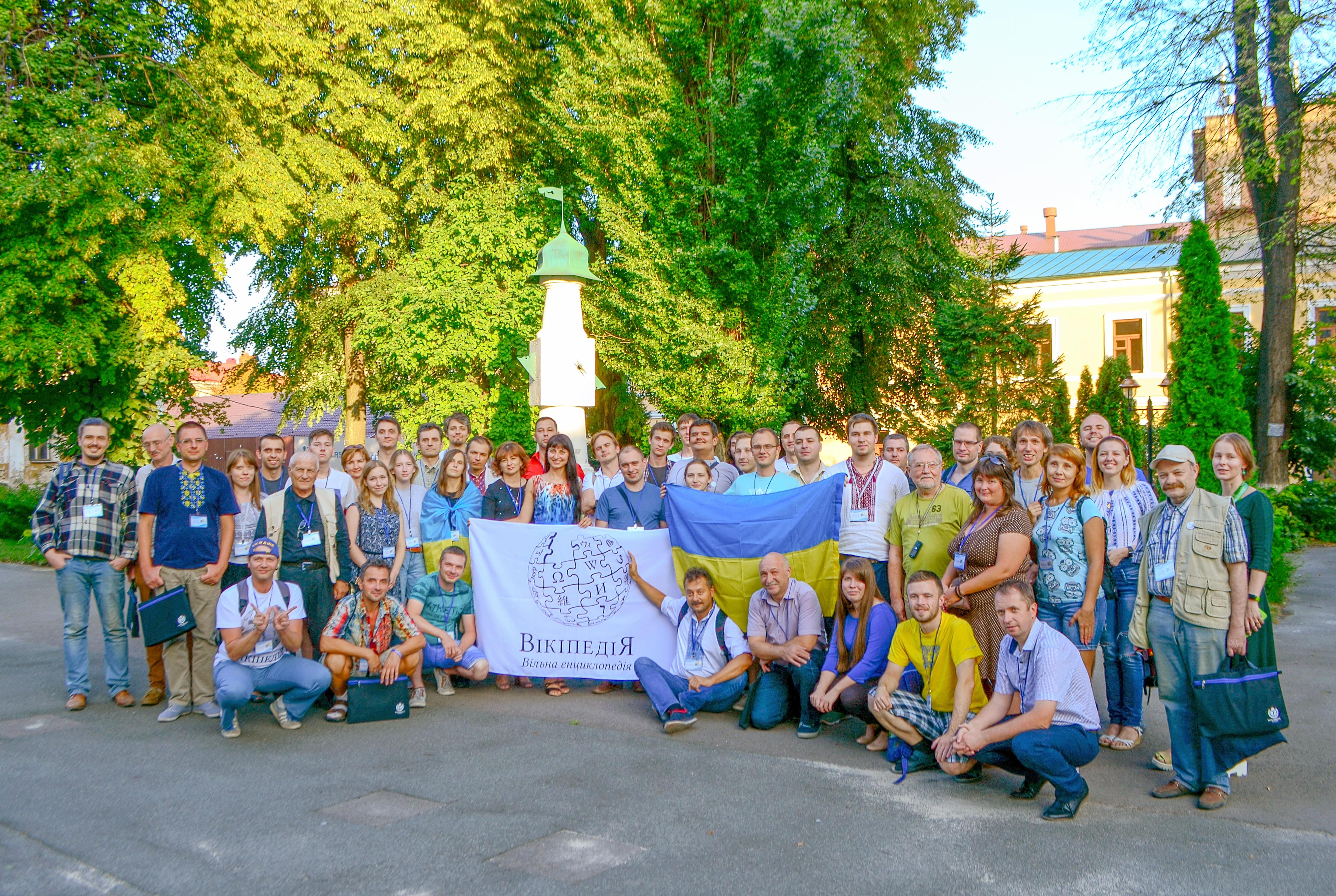 Вікіконференція 2018, Київ